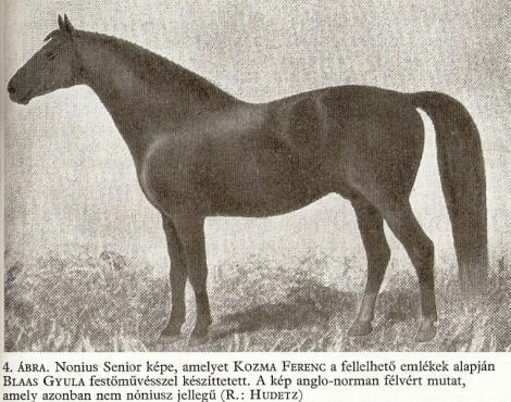 L'étalon français Nonius Senior, fondateur de la race de chevaux hongroise du Nonius. 4. ABRA. Dessin de Nonius Senior, créé par Kozma Ferenc avec l'aide du peintre Blaas Gyula. La photo montre un cheval demi-sang anglo-normand, qui n'est cependant pas de race Nonius. (R. HUDETZ).